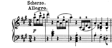 Compassos iniciais do terceiro movimento da Sonata Op. 2 n. 2 de Beethoven